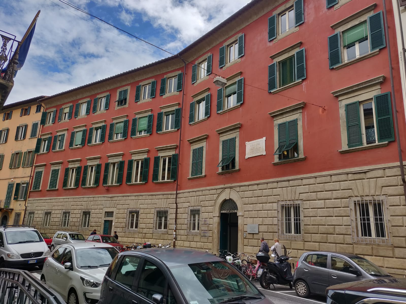 Facciata principale di Palazzo Venera, via Santa Maria 36, Pisa scattata il 5/20/2019